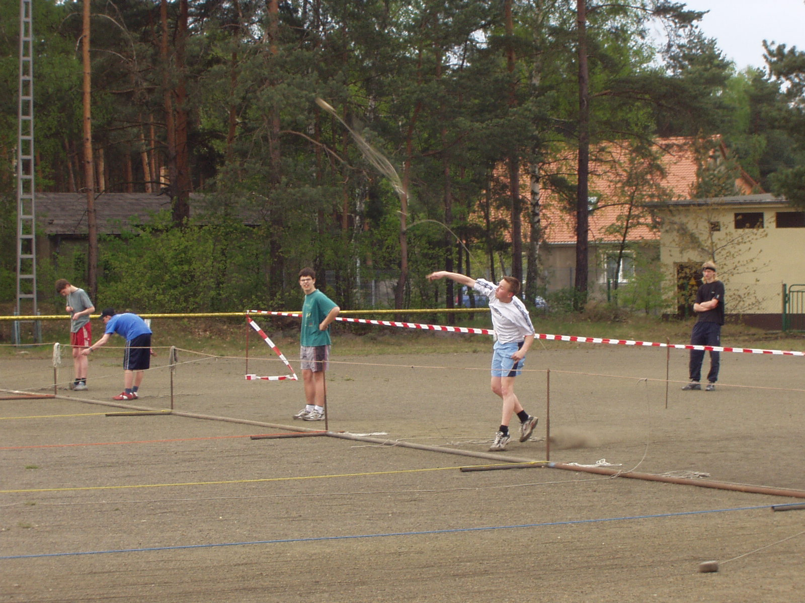 Werfen einer Wurfleine beim Krabatpokal 2004 in Hoyerswerda, Ortsteil Knappenrode